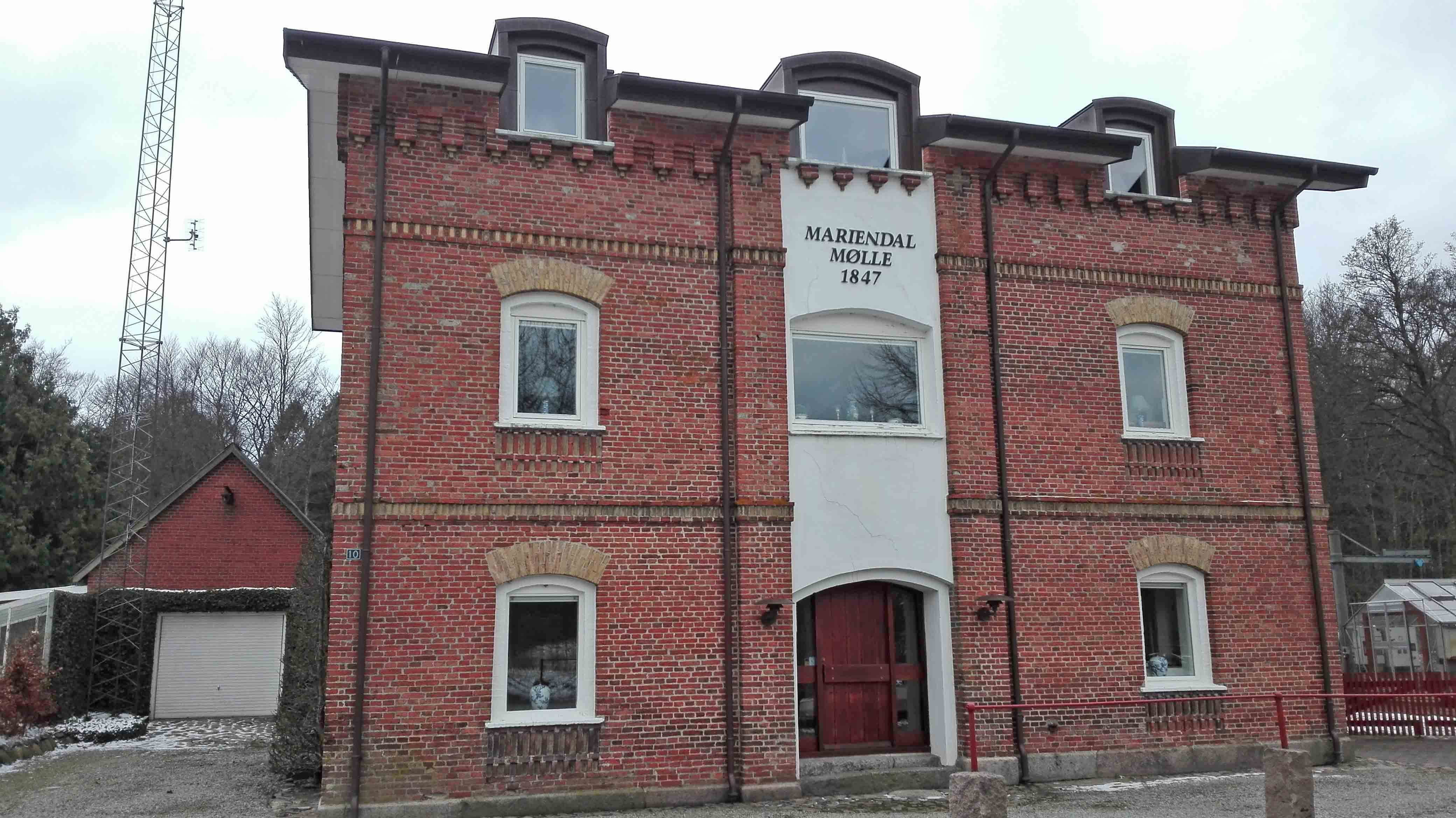 Mariendal Mølle på Elling Å i Elling fra 1847